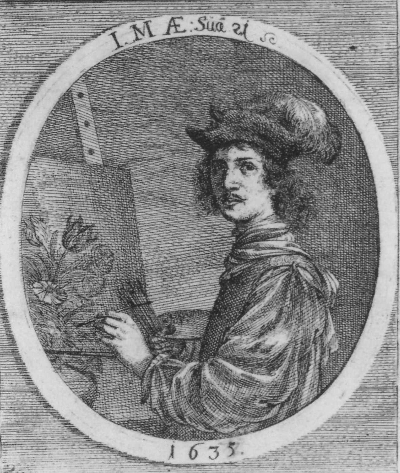 Selbstbildnis aus Artliches und Kunstreichs Reißbüchlein, Frankfurt